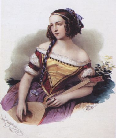 Актриса Варвара Николаевна Асенкова (1817-1841) в роли Эсмеральды